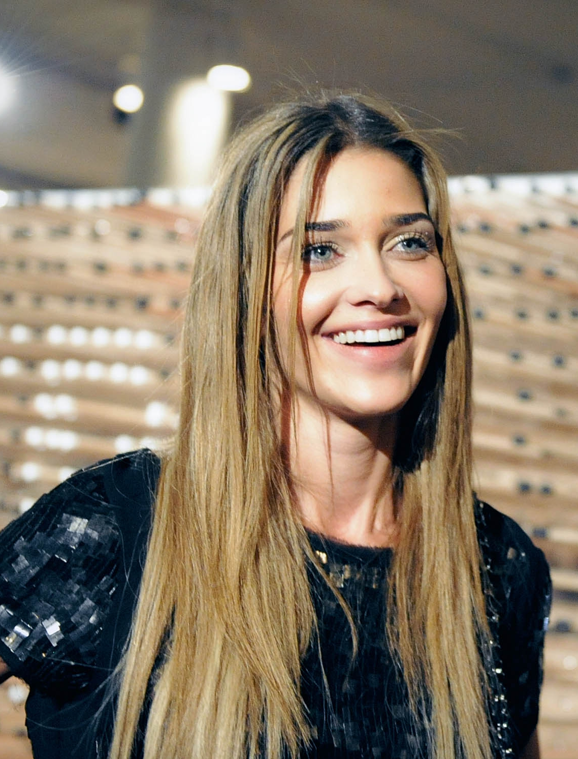 A top model brasileira Ana Beatriz Barros em 2011, na São Paulo Fashion Week